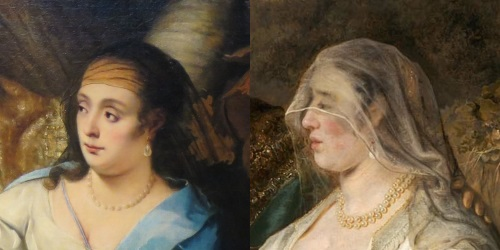 Visage de Tamar dans les tableaux de Ferdinand Bol de 1644 et 1653.